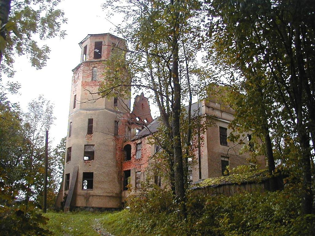 Veckārķu pils drupas 2004-09-25